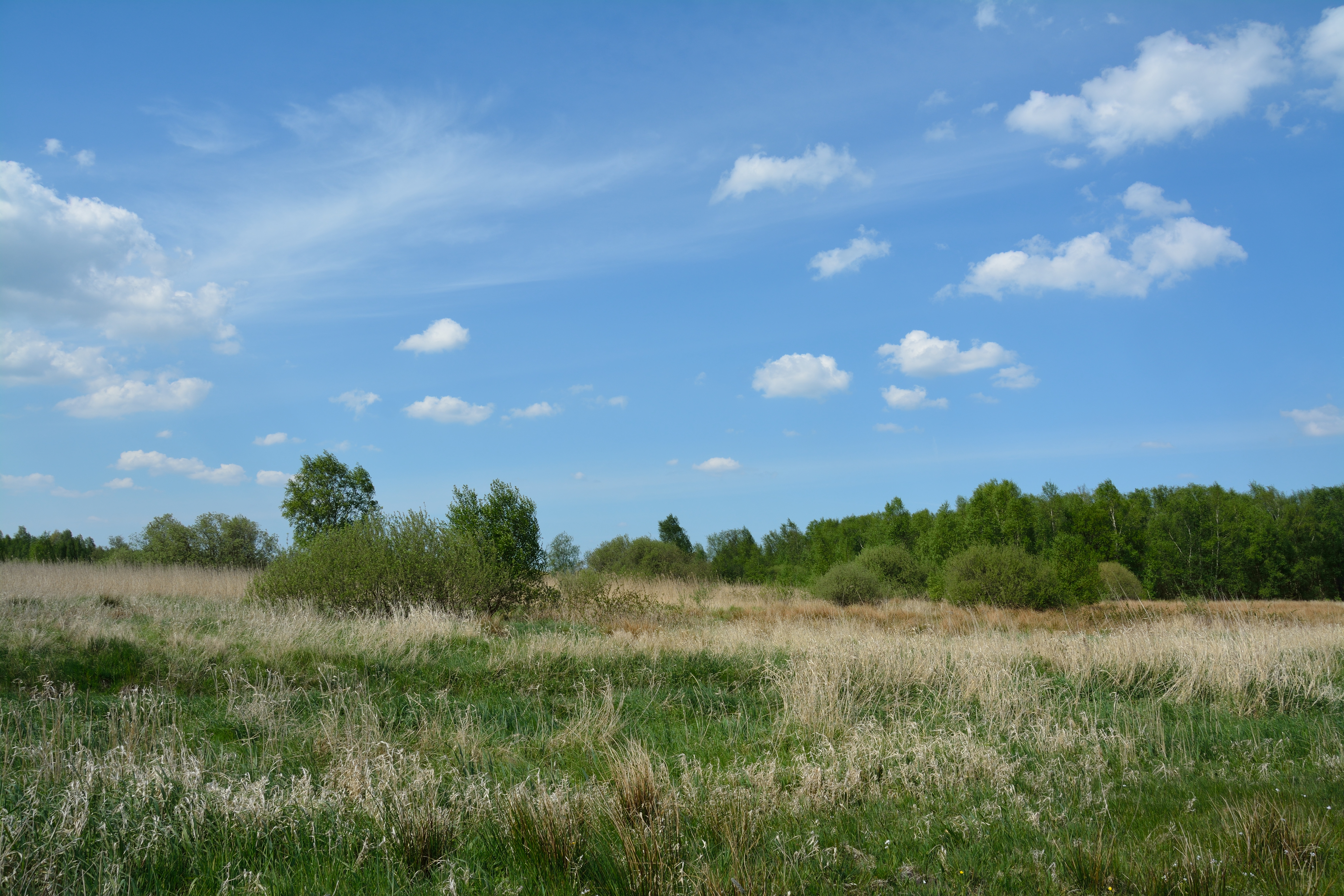 Impressionen aus dem FFH-Gebiet "Vaaler Moor und Herrenmoor" im Kreis Steinburg, Schleswig-Holstein Dies ist ein Foto aus dem Teilgebiet "Vaaler Moor"